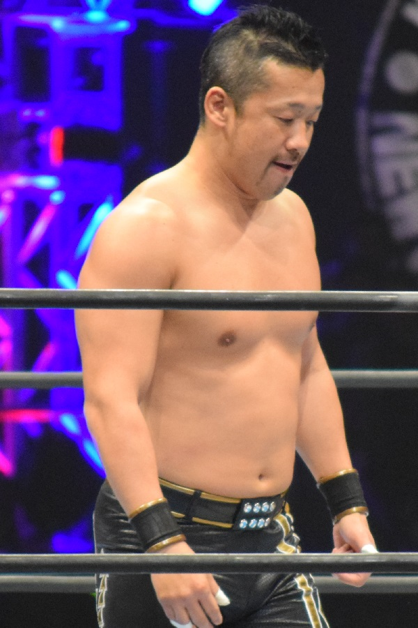 2017年2月11日 大阪府立体育会館 「THE NEW BEGINNING in OSAKA」 金丸義信